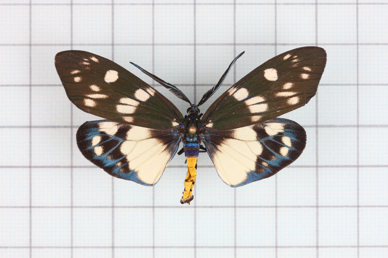 Eterusia aedea formosana Jordan, 1907 茶斑蛾 認識台灣的昆蟲12:p.39